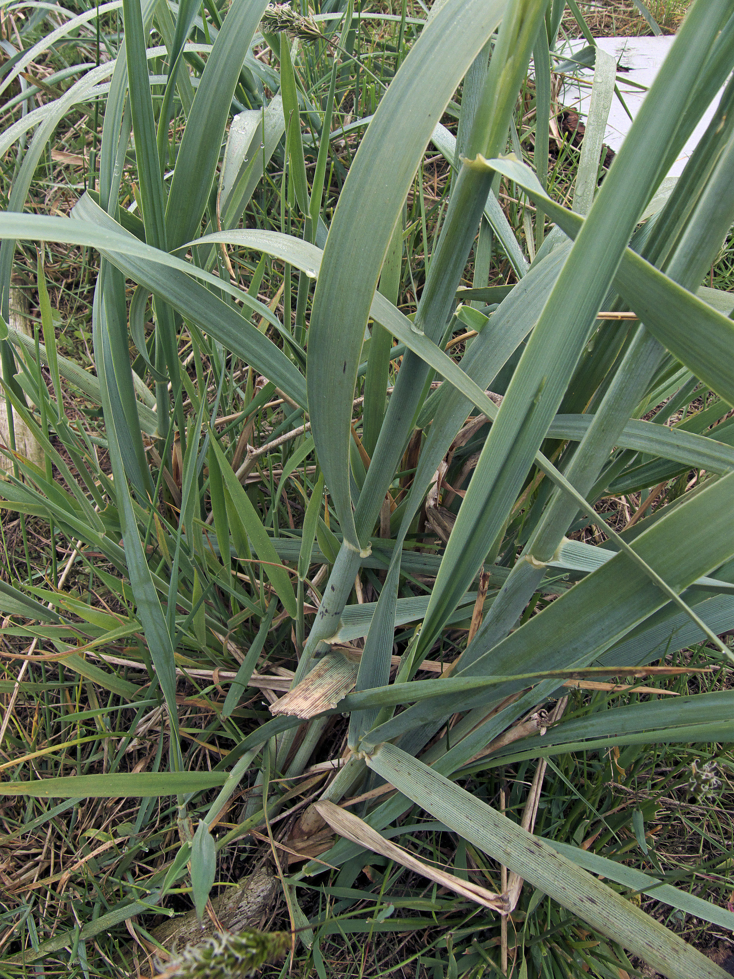 Leymus arenarius (zandhaver), uitstoelende plant